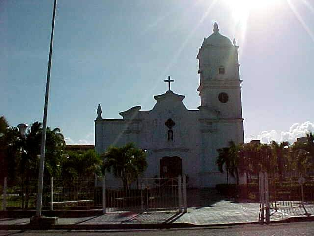 Higuerote en el estado Miranda - Venezuela